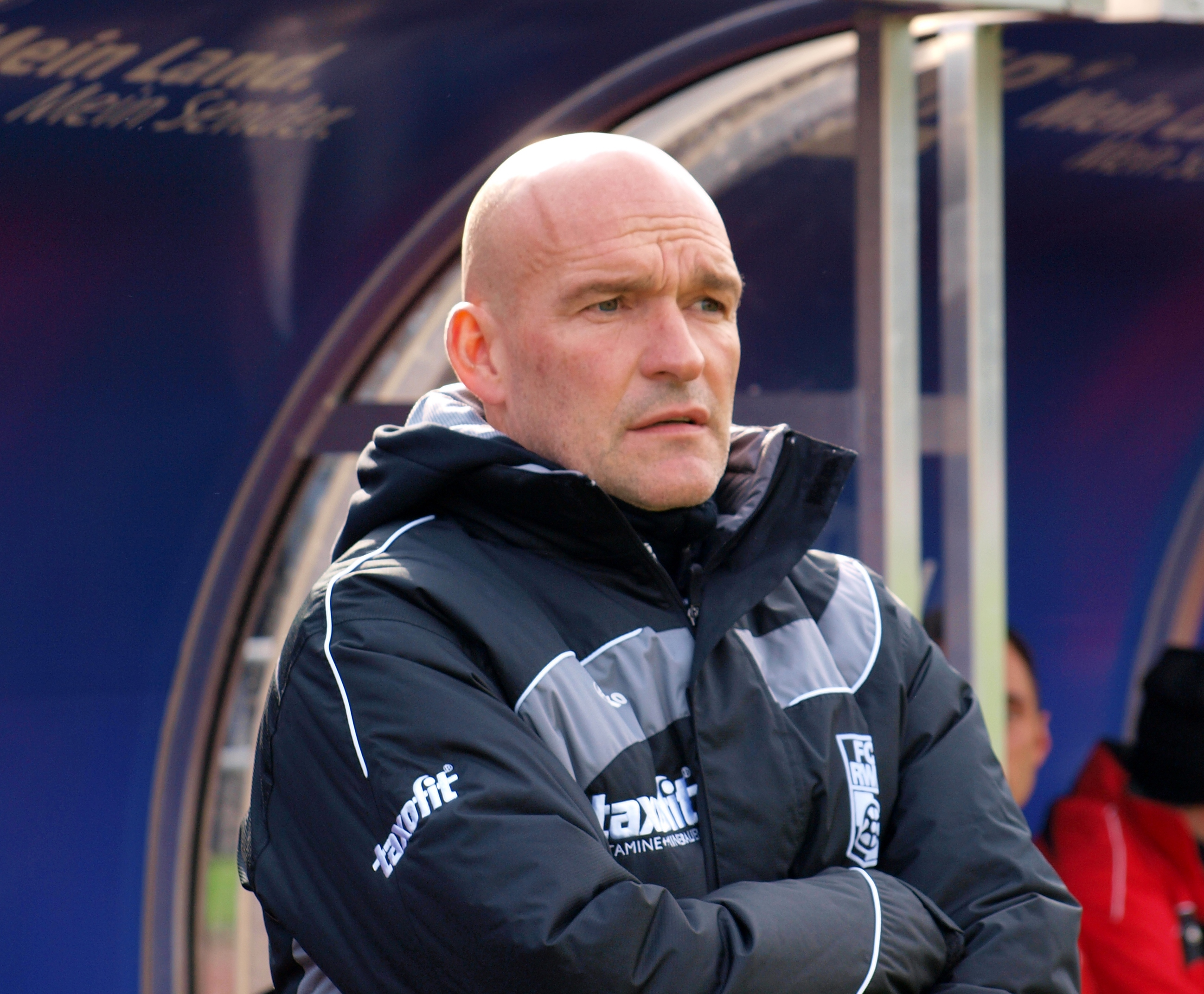 Stefan Emmerling beim Gastspiel seiner Erfurter in Saarbrücken